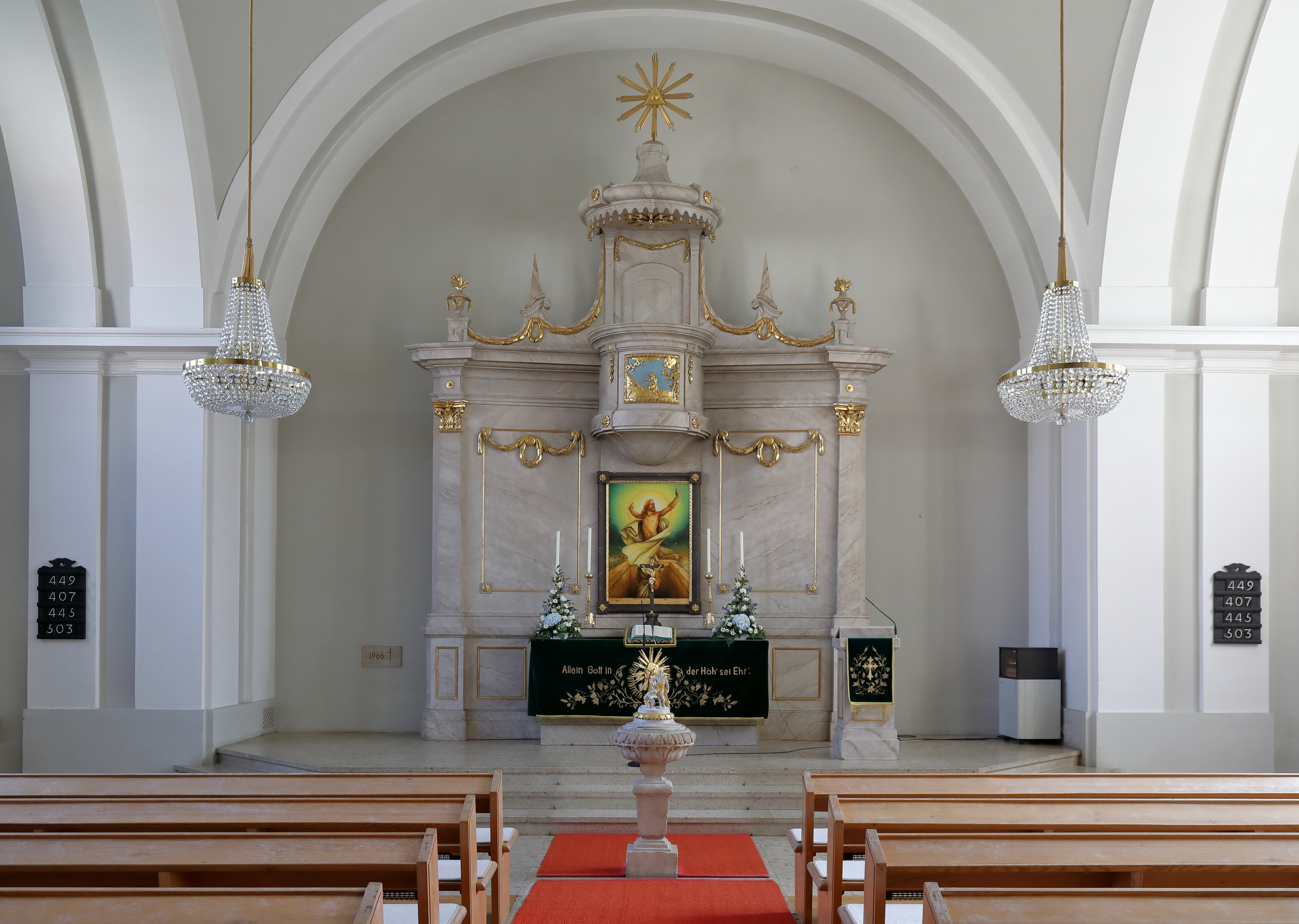 Altar der Christuskirche in der Mörbisch am See.